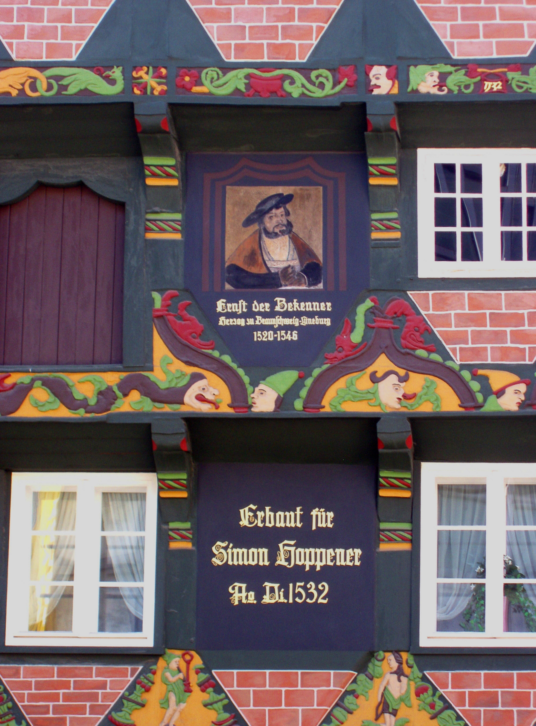 Bild von Ernst dem Bekenner und Inschrift am Hoppener Haus in Celle